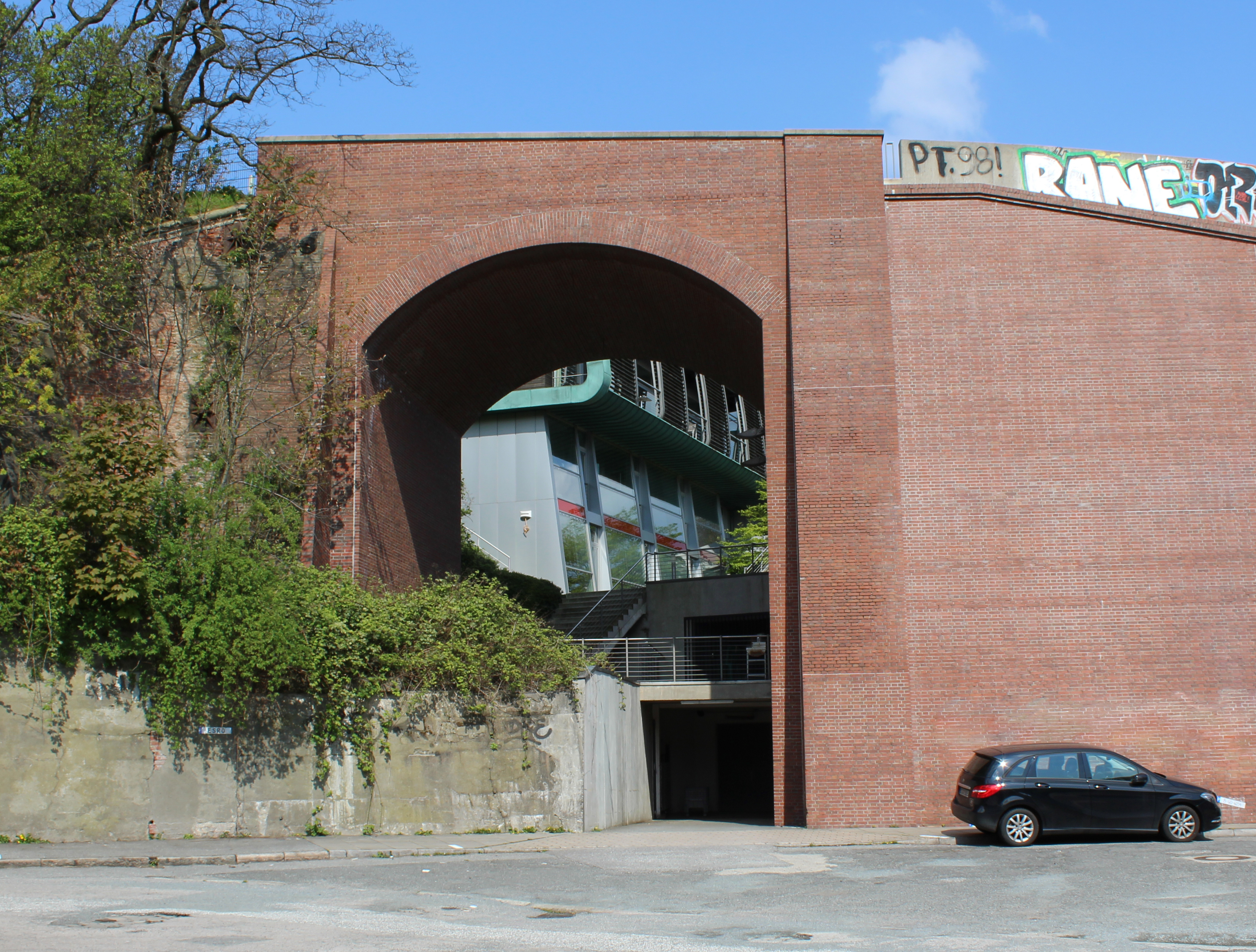 Überbrückung der ehem. Geneigten Ebene (Südliche Elbbergbrücke) von 1844